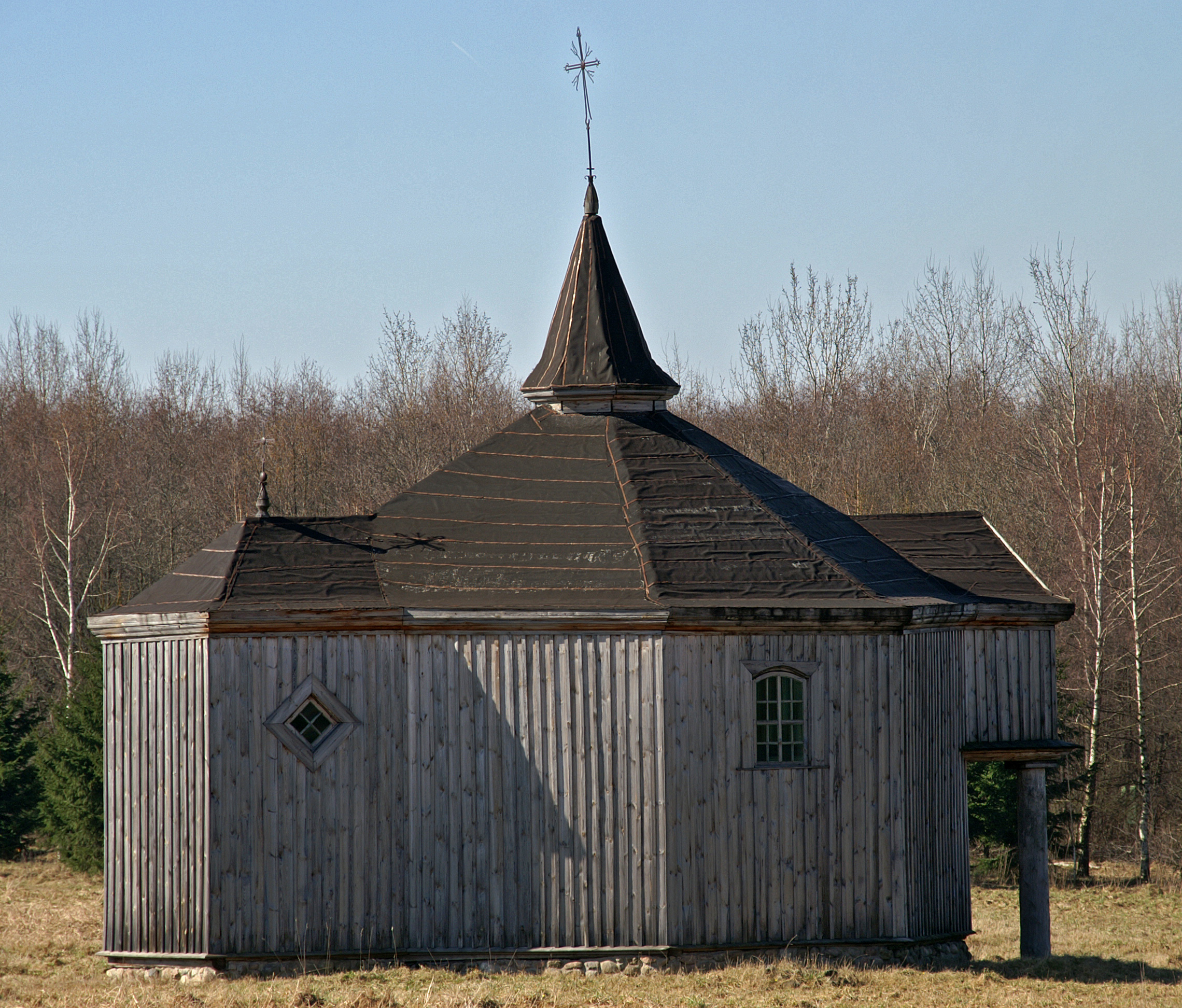 Беларуская (тарашкевіца): Капліца зь в. Каралеўцы Вялейскага раёну Менскай вобласьці. в. Азярцо This is a photo of Belarusian heritage monument. Reference number: 612Г000405 ( WLM)